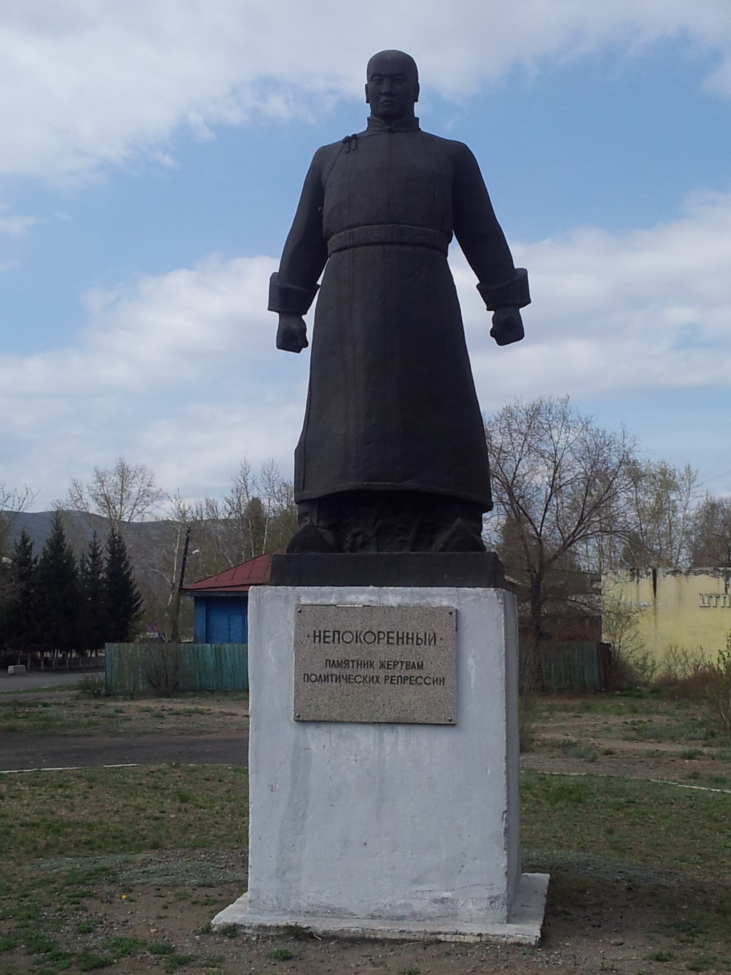 Тыва дыл: х.Кызыл. Политиктиг репрессияларга таварышканнарга тураскаал